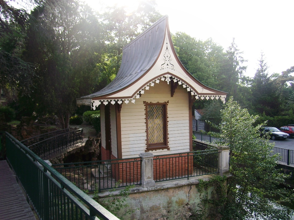 La pagode tonkinoise du parc de la source d'Arpajon (91)